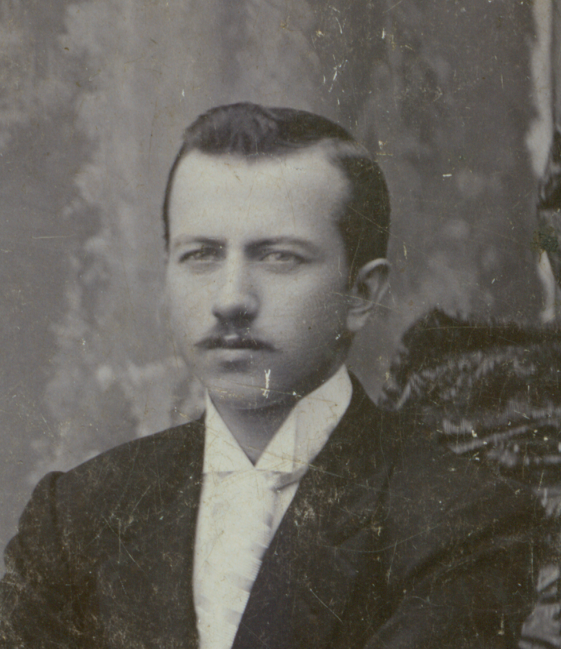 Замков Алексей Андреевич (муж В.И. Мухиной) в молодости. Фрагмент фото с родственниками: Буренковым Павлом Андреевичем (слева) и Чуренковым Кузьмой Васильевичем (в центре). Все трое работали в артели "Московского купеческого банка". Замков и Чуренков двоюродные братья (фото из архива Филатова Олега Владимировича).